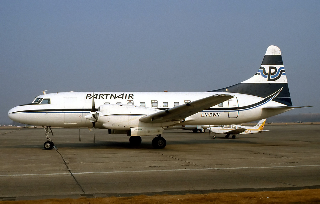 LN-BWN Convair 580 Partnair 1985